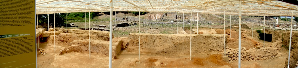 Panoramique composé d'un chantier de fouilles de Roselle